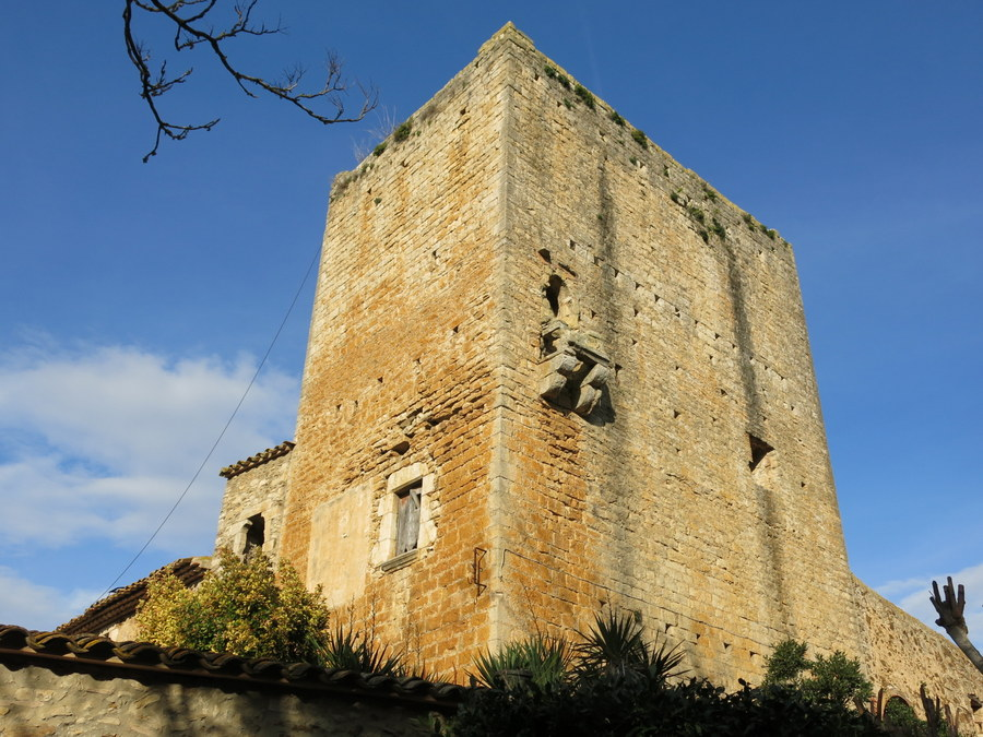 castell d' Esclanyà ( Begur) - Baix Empordà - Catalunya